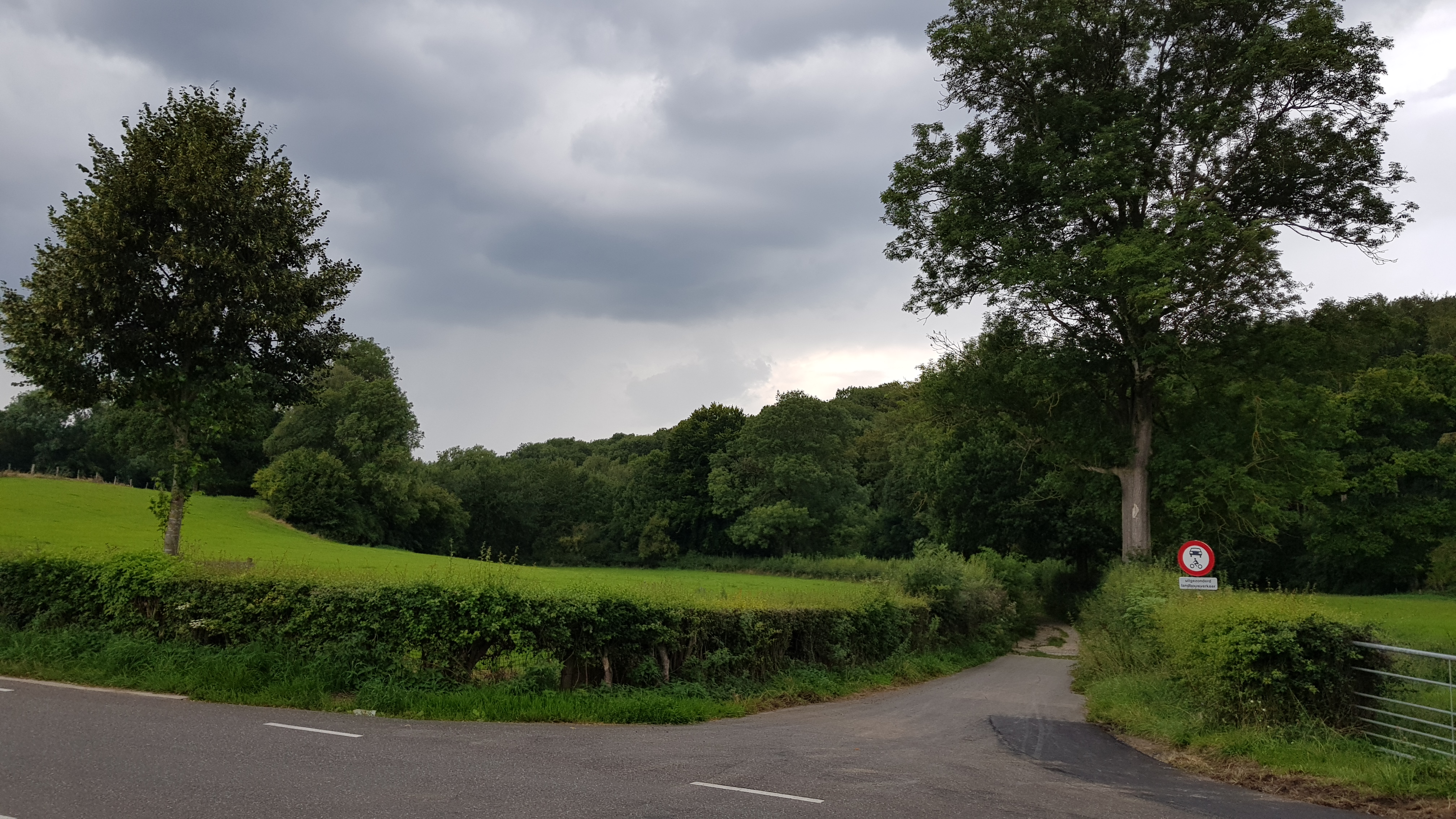 Dorregrubbe ter hoogte van Keerestraat bij Cadier en Keer, Nederland